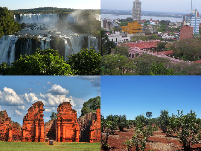 Montage de fotos de la Provincia de Misiones